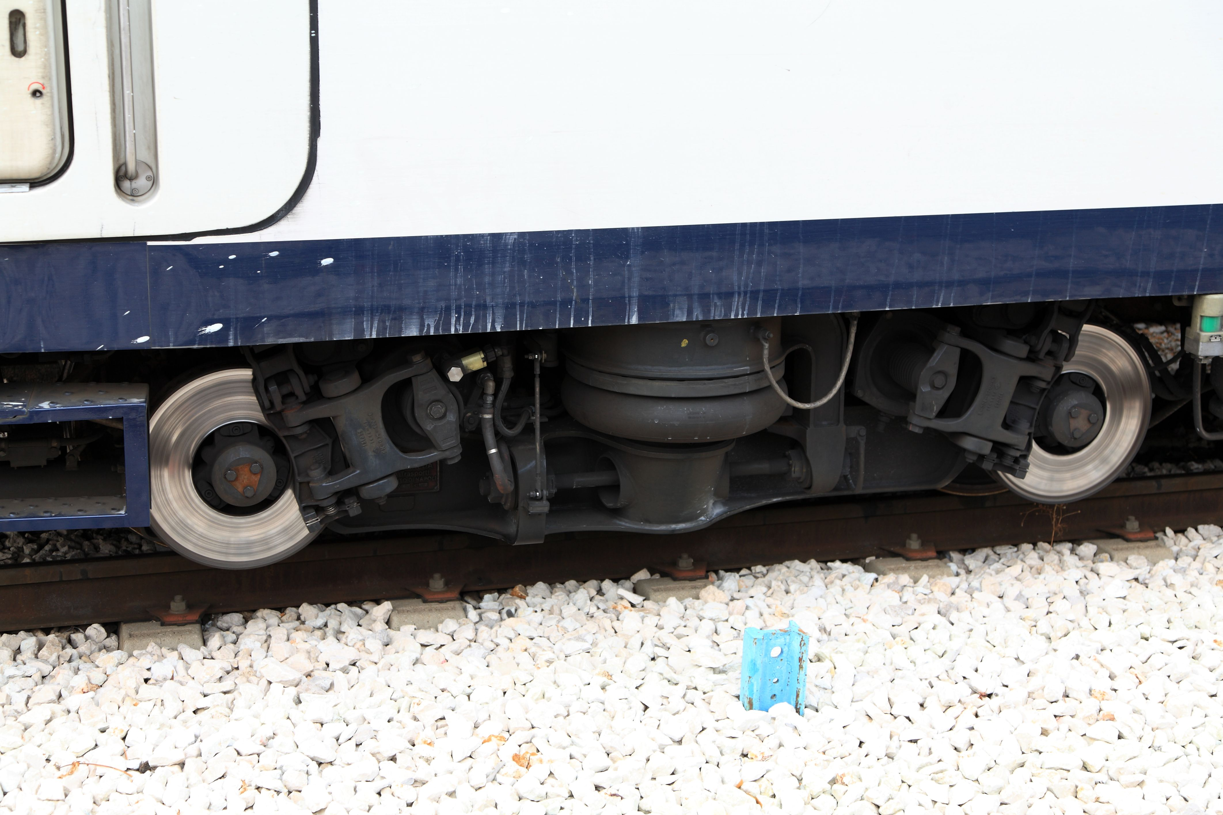 Aus Platzgründen mussten die Bremsscheiben und -zangen außenliegend eingebaut worden.